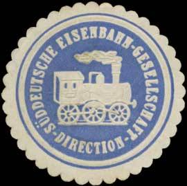 Siegelmarke der Direction der Süddeutsche Eisenbahngesellschaft